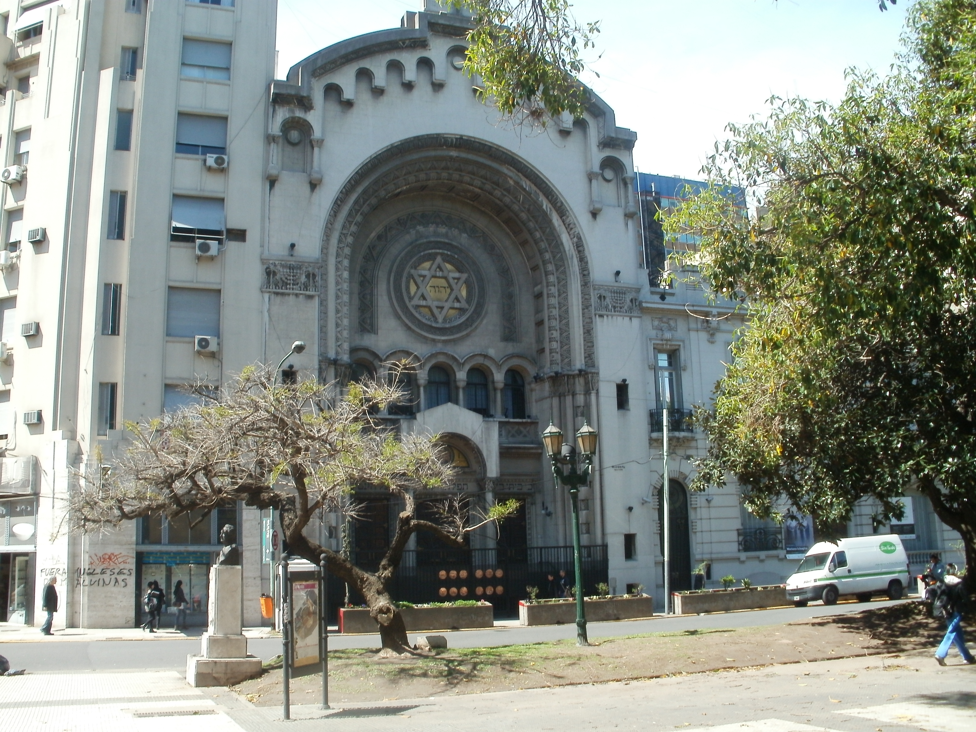 El Templo Libertad, ubicado a una cuadra del Teatro Colón.